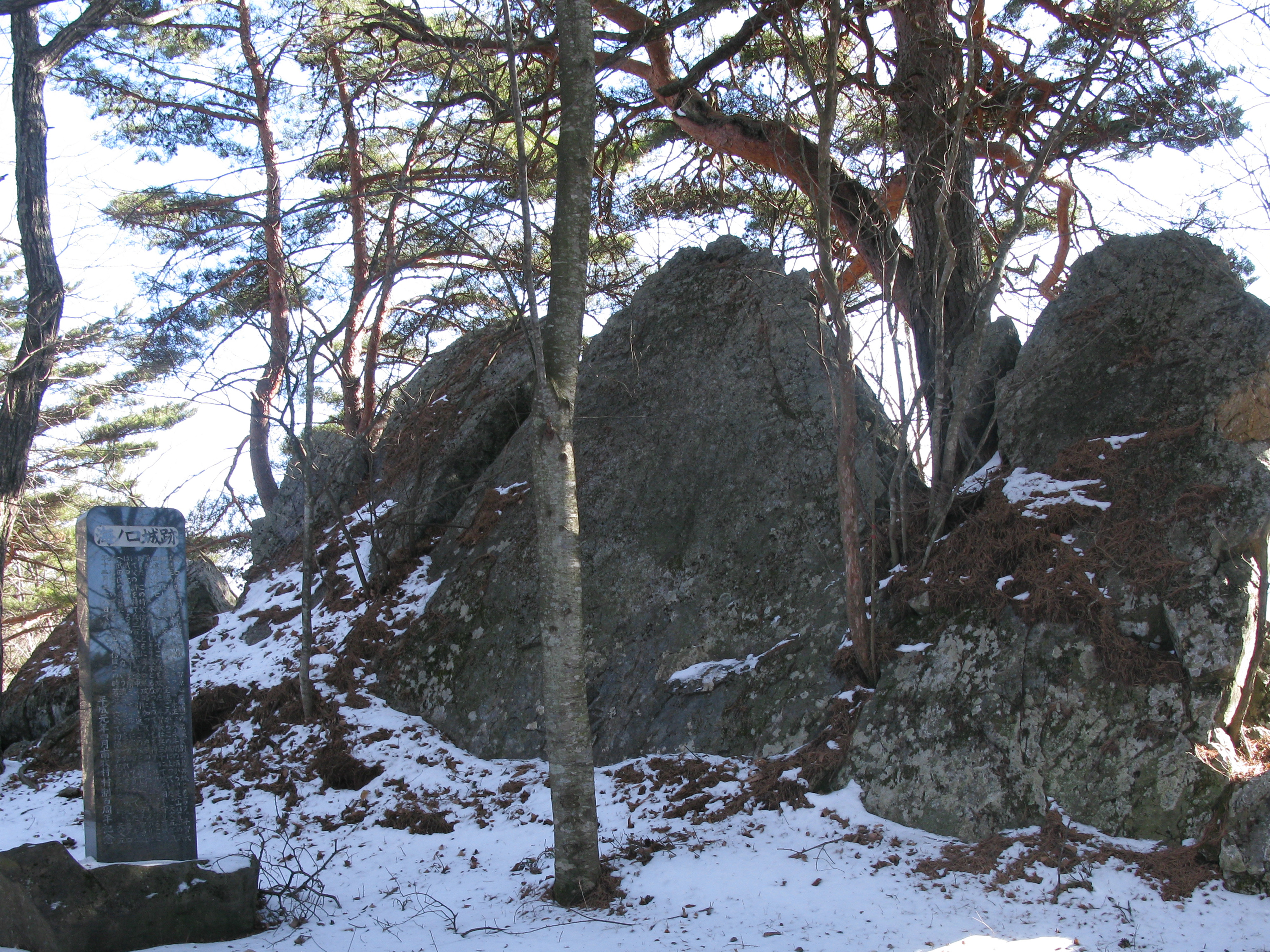 海ノ口城主郭部の巨石